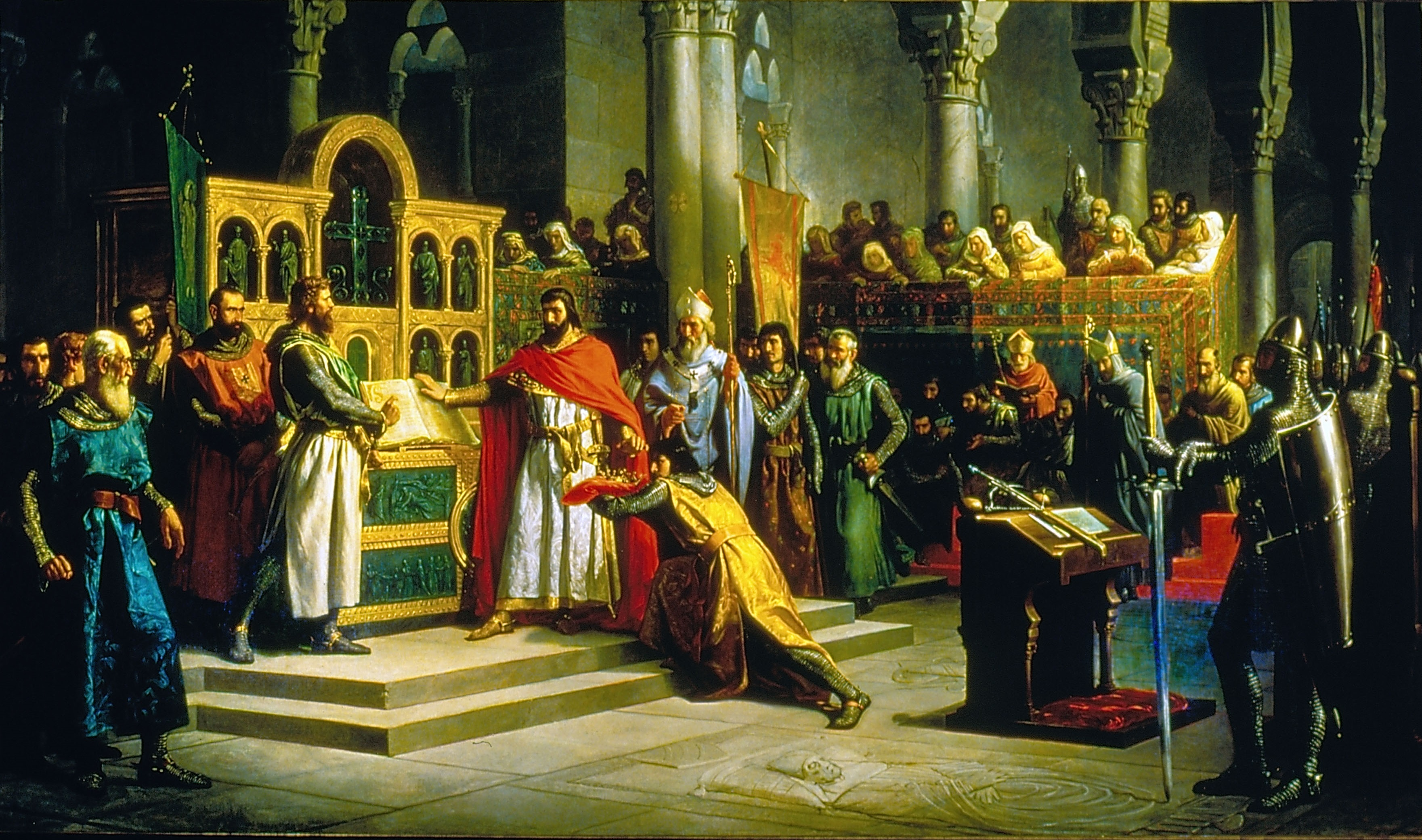 Lienzo que representa la Jura de Santa Gadea, acontecimiento supuestamente histórico ocurrido en el año 1072, y en la que Alfonso VI, rey de Castilla y León, hubo de jurar en la iglesia de Santa Gadea de Burgos, ante Rodrigo Díaz de Vivar, llamado «el Cid Campeador», que no había tomado parte en el asesinato de su hermano, el rey Sancho II de Castilla, quien fue asesinado ante los muros de la ciudad de Zamora en 1072.